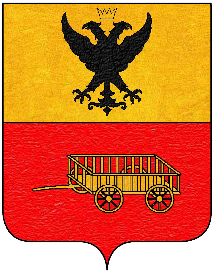 Stemma della famiglia Carminati